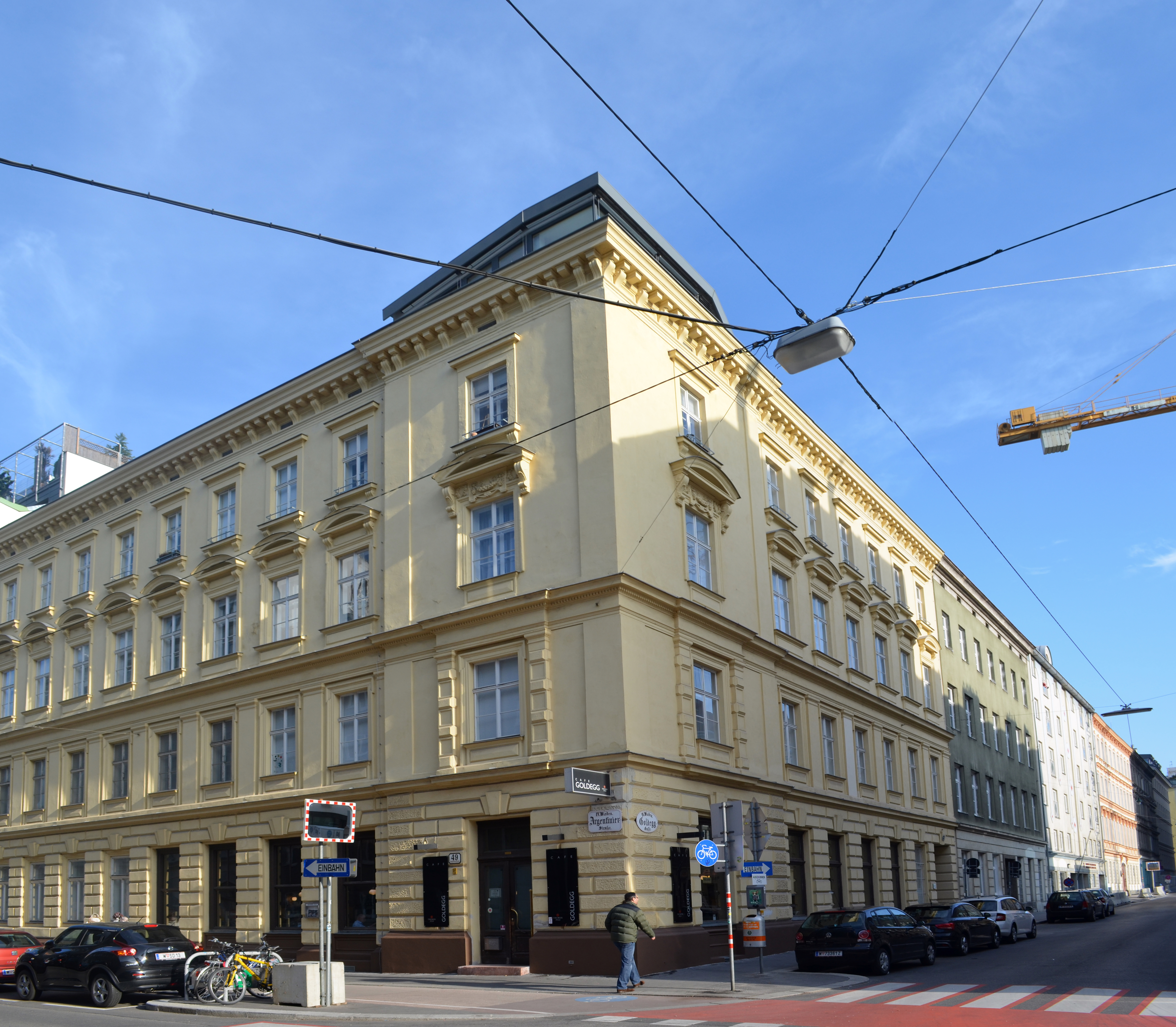 Wien, Cafe Goldegg